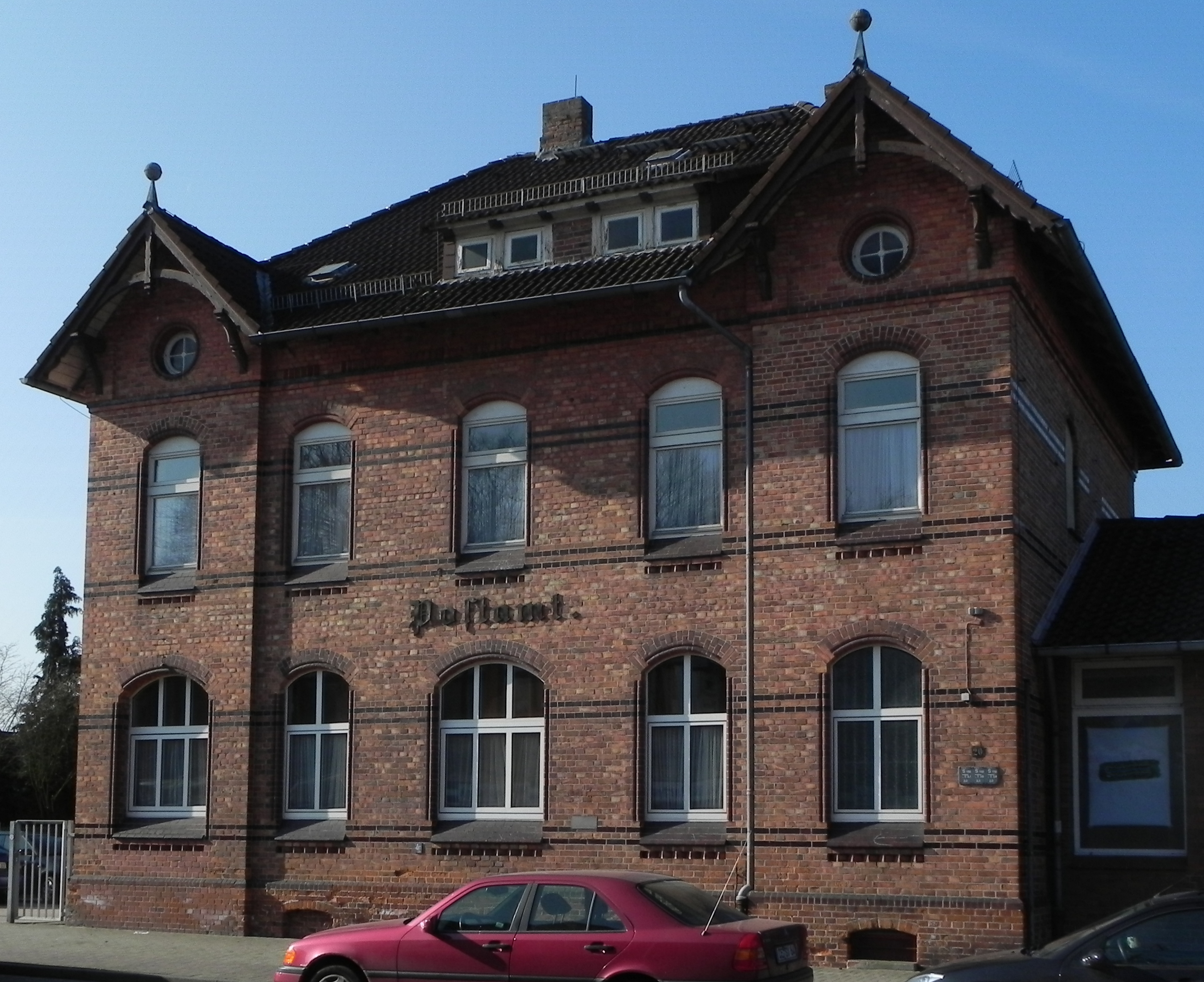 Altes Postamt von 1902 in Bergen (Celle), Niedersachsen, Germany